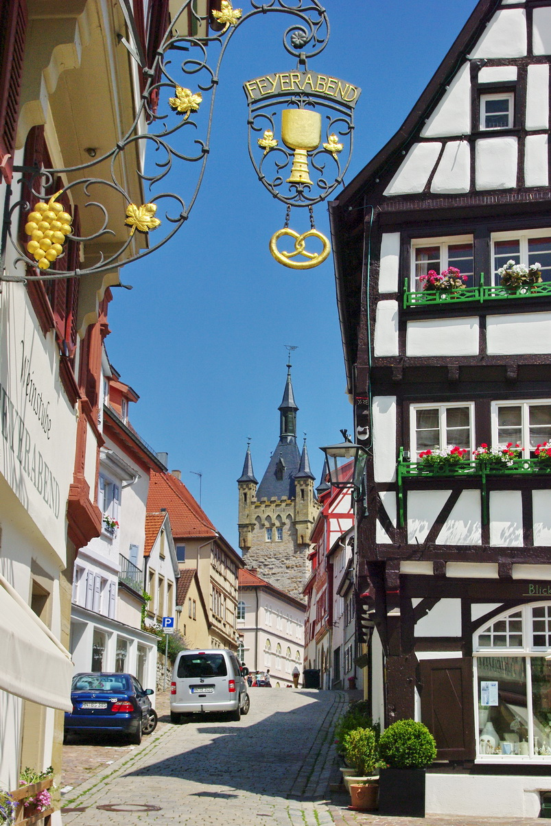 Blick durch die Salzgasse zum Blauen Turm